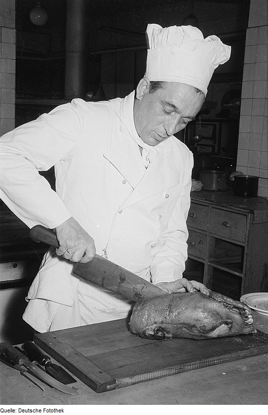 Original image description from the Deutsche Fotothek Portrait des Küchenmeisters vom "Auerbachs Keller" beim Tranchieren von Geflügelfleisch